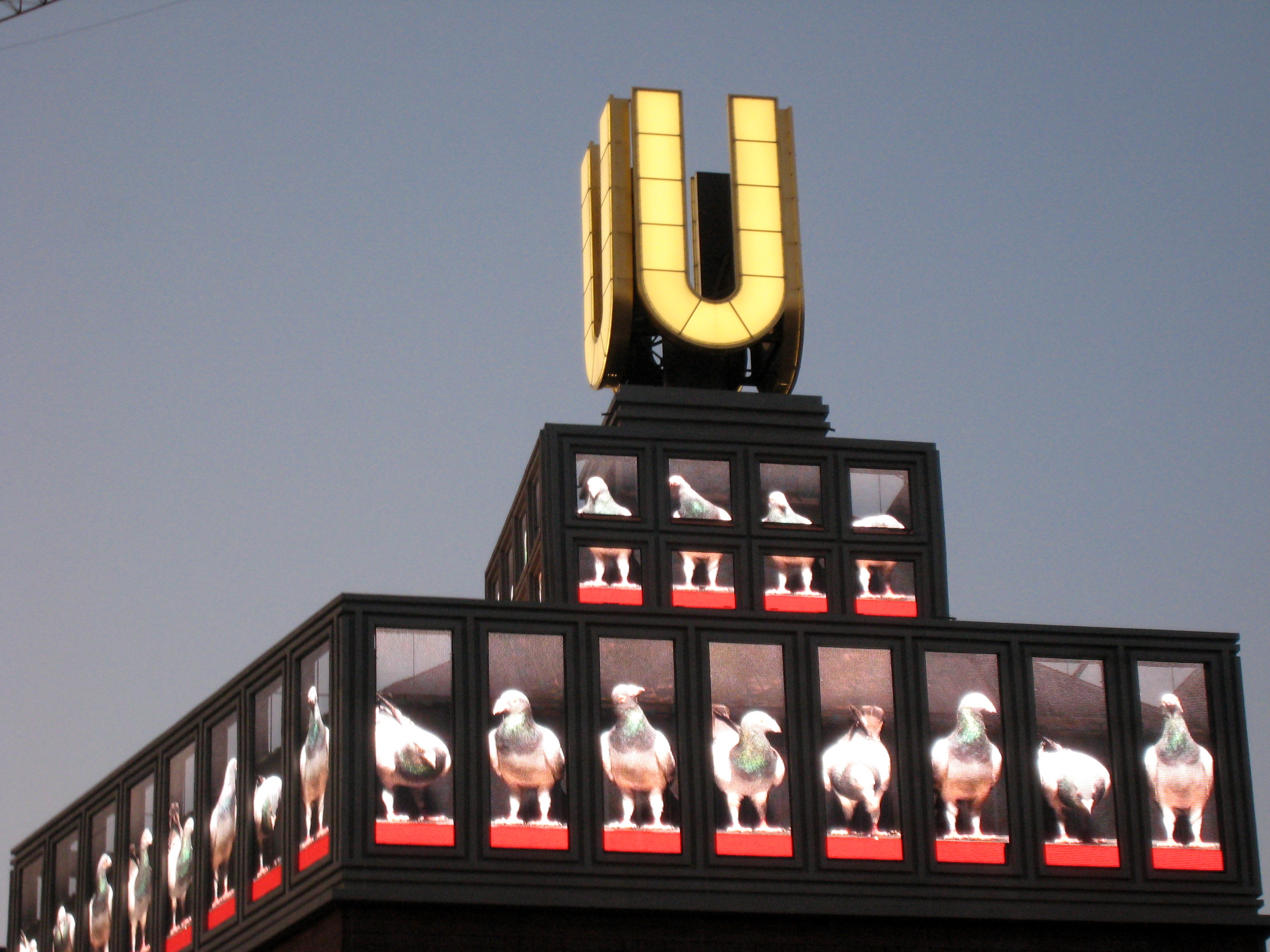 Videoinstallation Fliegende Bilder, Dortmunder U